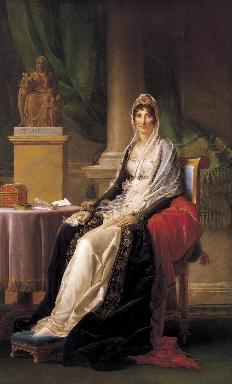 Portrait de Maria Letizia Ramolino, Madame Mère, mère de Napoléon Bonaparte assise dans un intérieur auprès d'une statue allégorique de la Fécondité